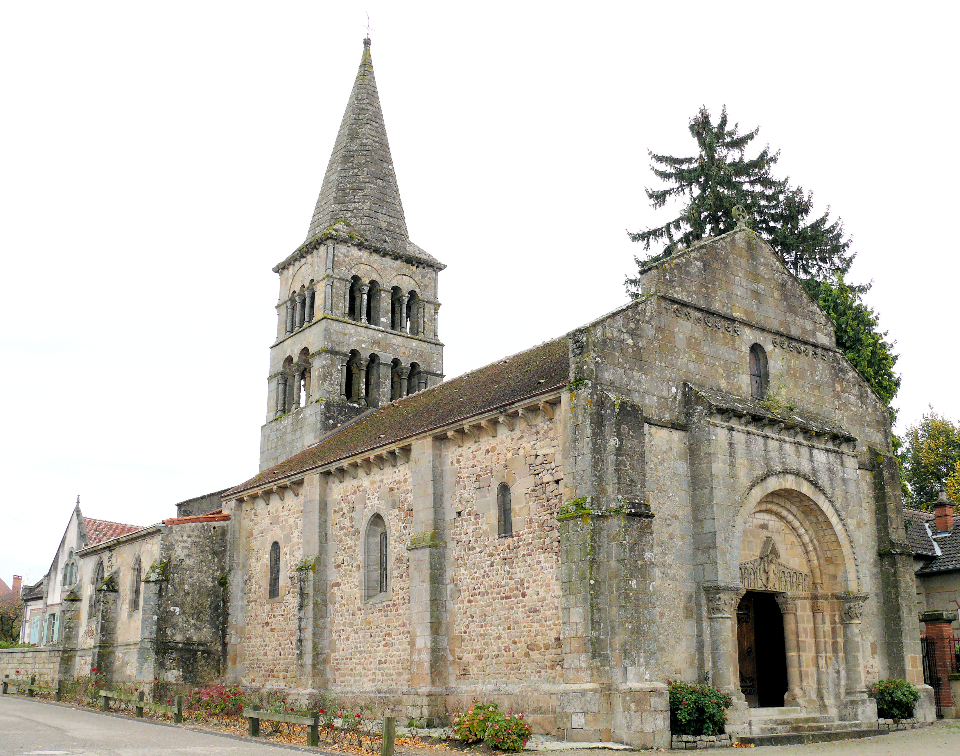 Meillers - Église Saint-Julien